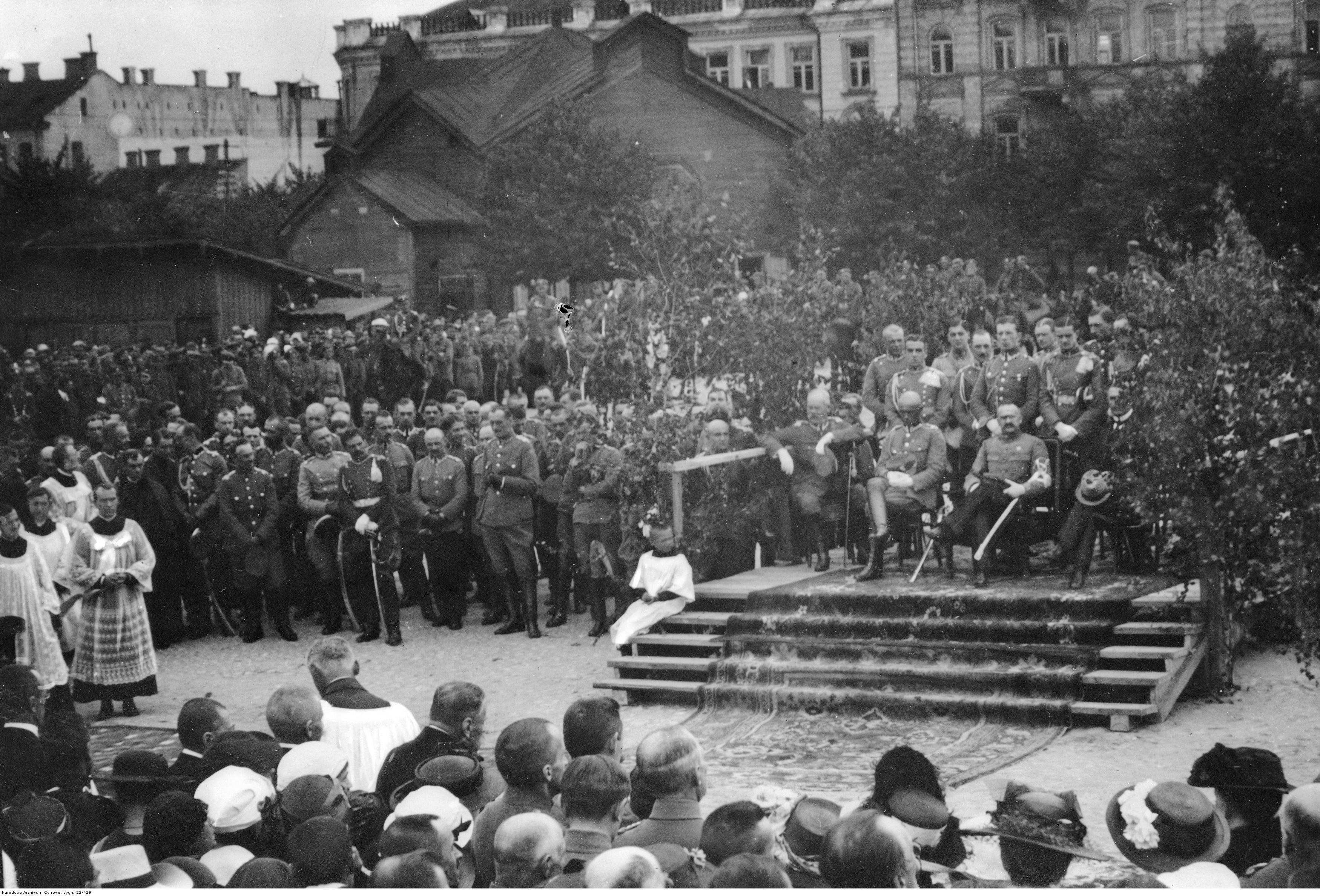 Naczelnik Państwa Józef Piłsudski podczas mszy świętej. Na lewo od niego siedzi gen. Edward Śmigły-Rydz. Na lewo od podwyższenia, na pierwszym planie, oparty o szablę stoi płk Władysław Belima- Prażmowski.